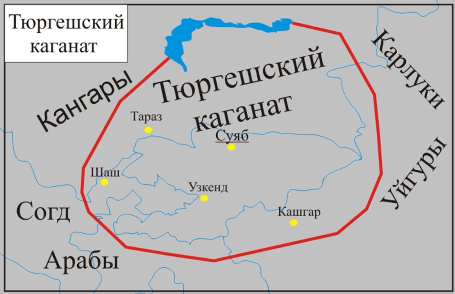 Карта Тюргешского каганата